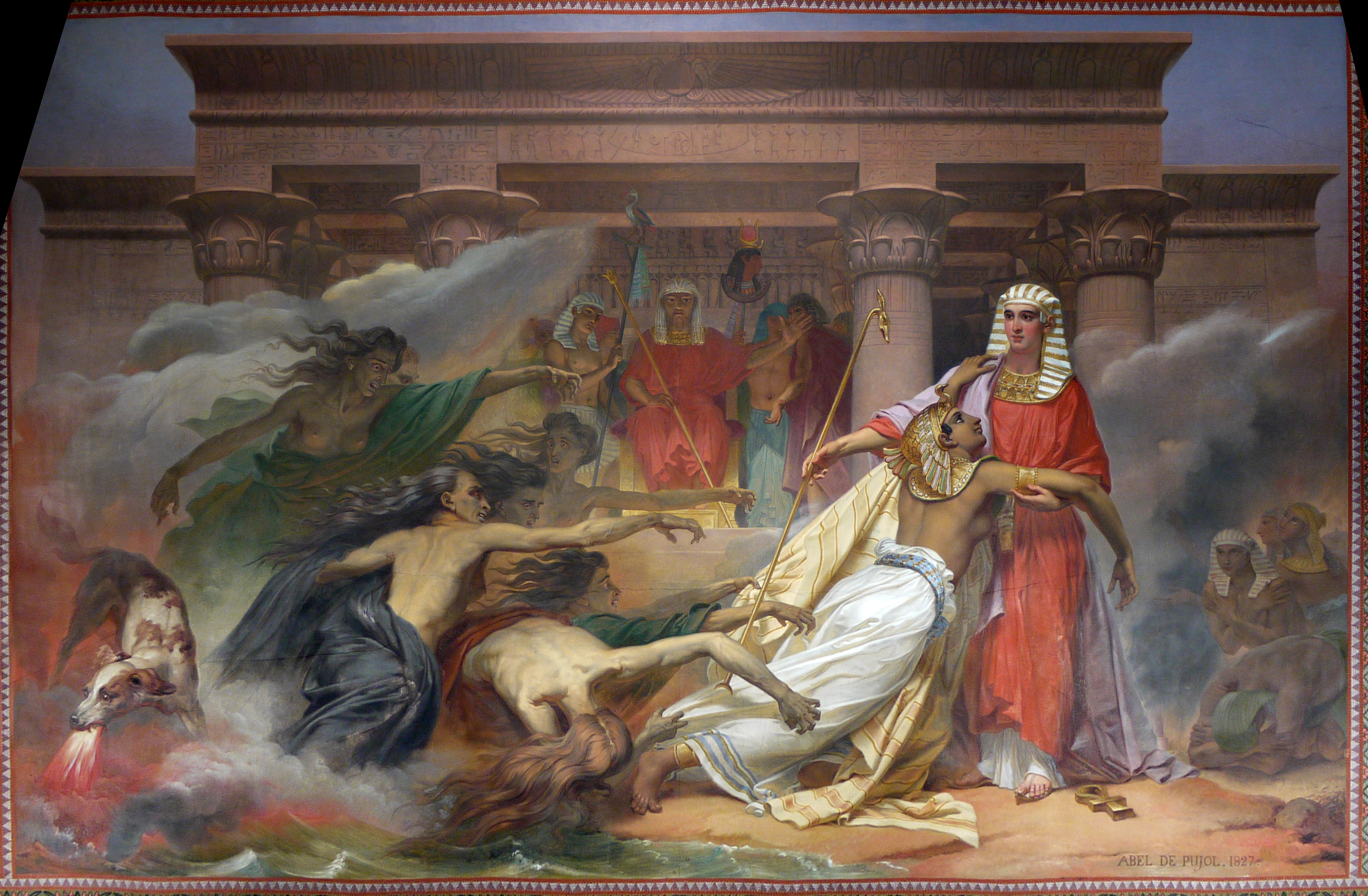 Painted ceiling at the Musée Charles X (Musée du Louvre), Paris.